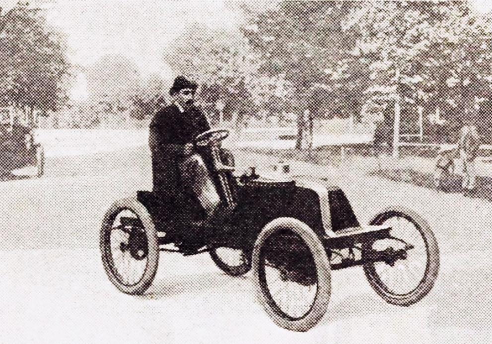 Louis Renault première voiturette après Paris-Bordeaux 1901 (12e au général) - La Vie au Grand Air, 15 décembre 1920, p.49